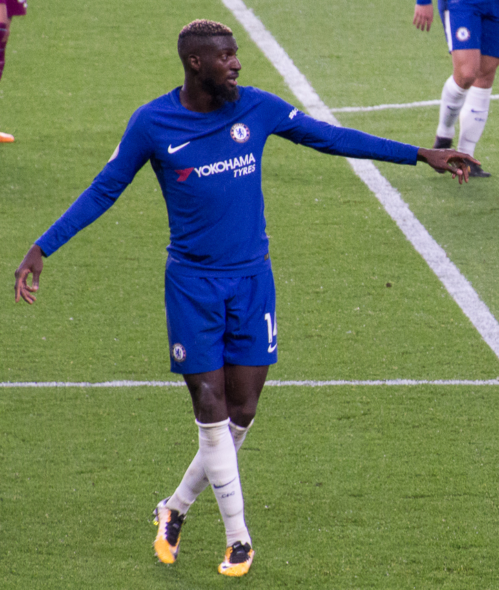 Chelsea 0 Manchester City 1 30.9.17